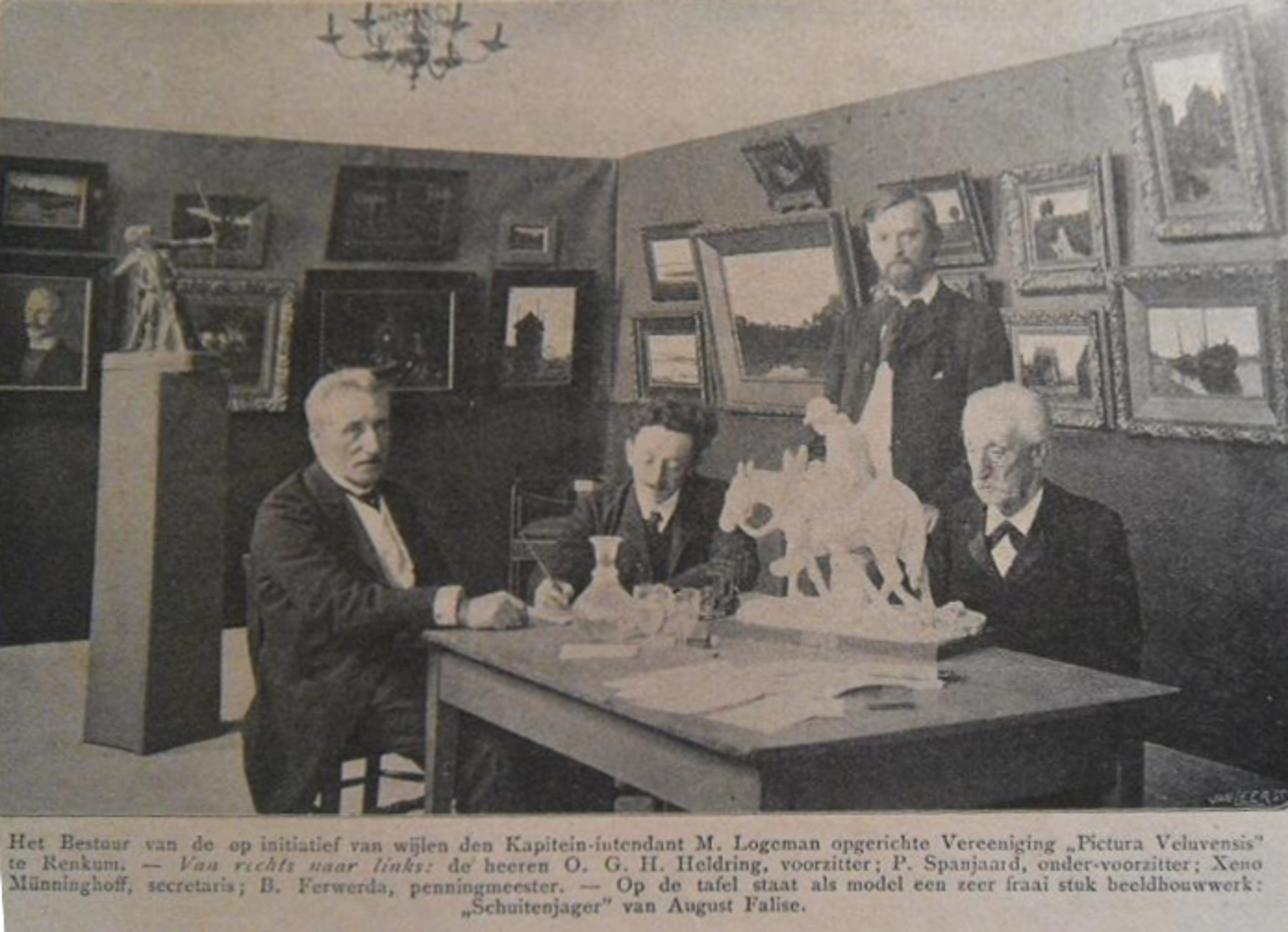 Bestuur kunstenaarsvereniging Pictura Veluvensis